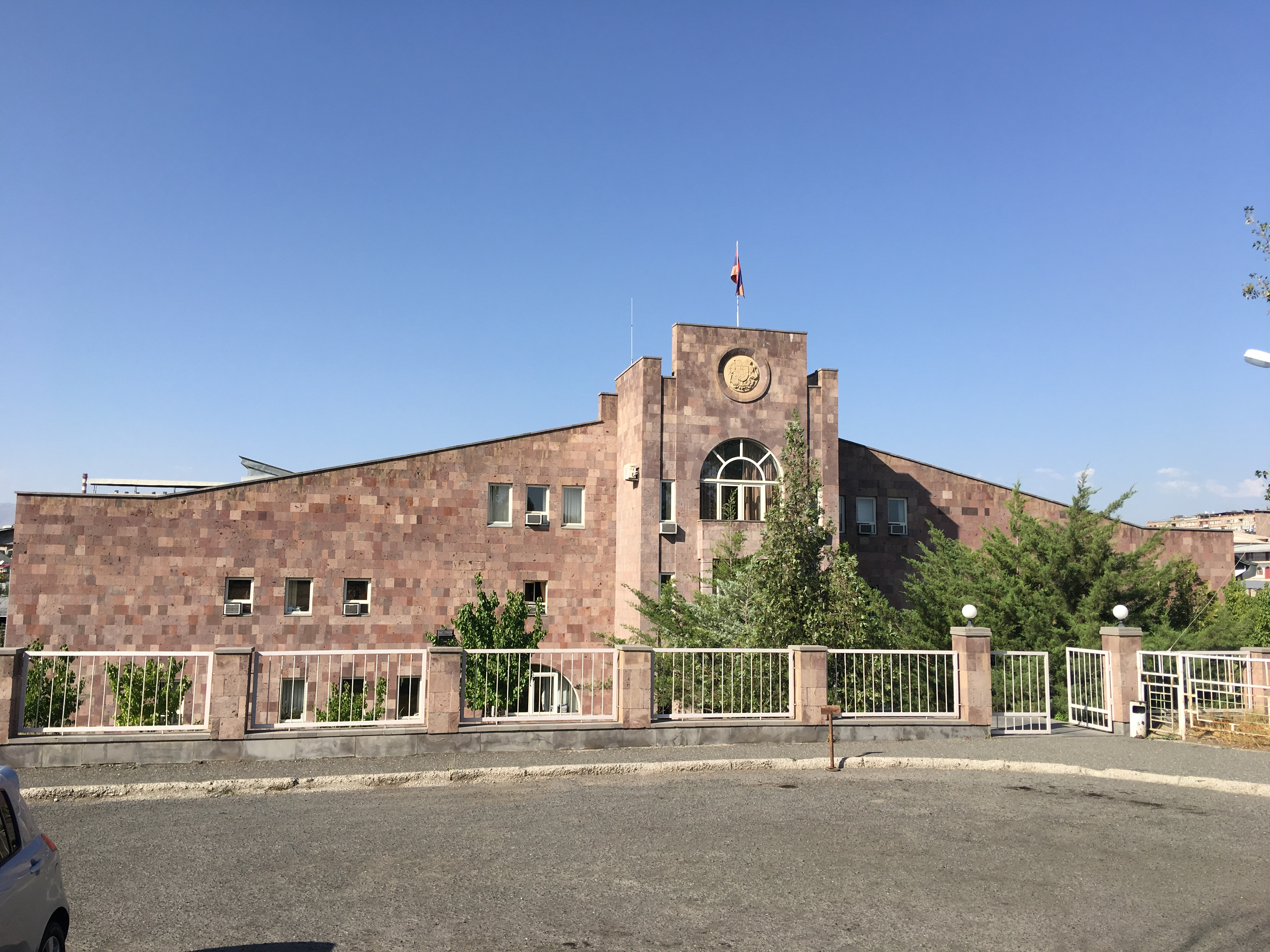 Մալաթիա-Սեբաստիա վարչական շրջանի ընդհանուր իրավասության դատարան, Երևան, Հայաստան